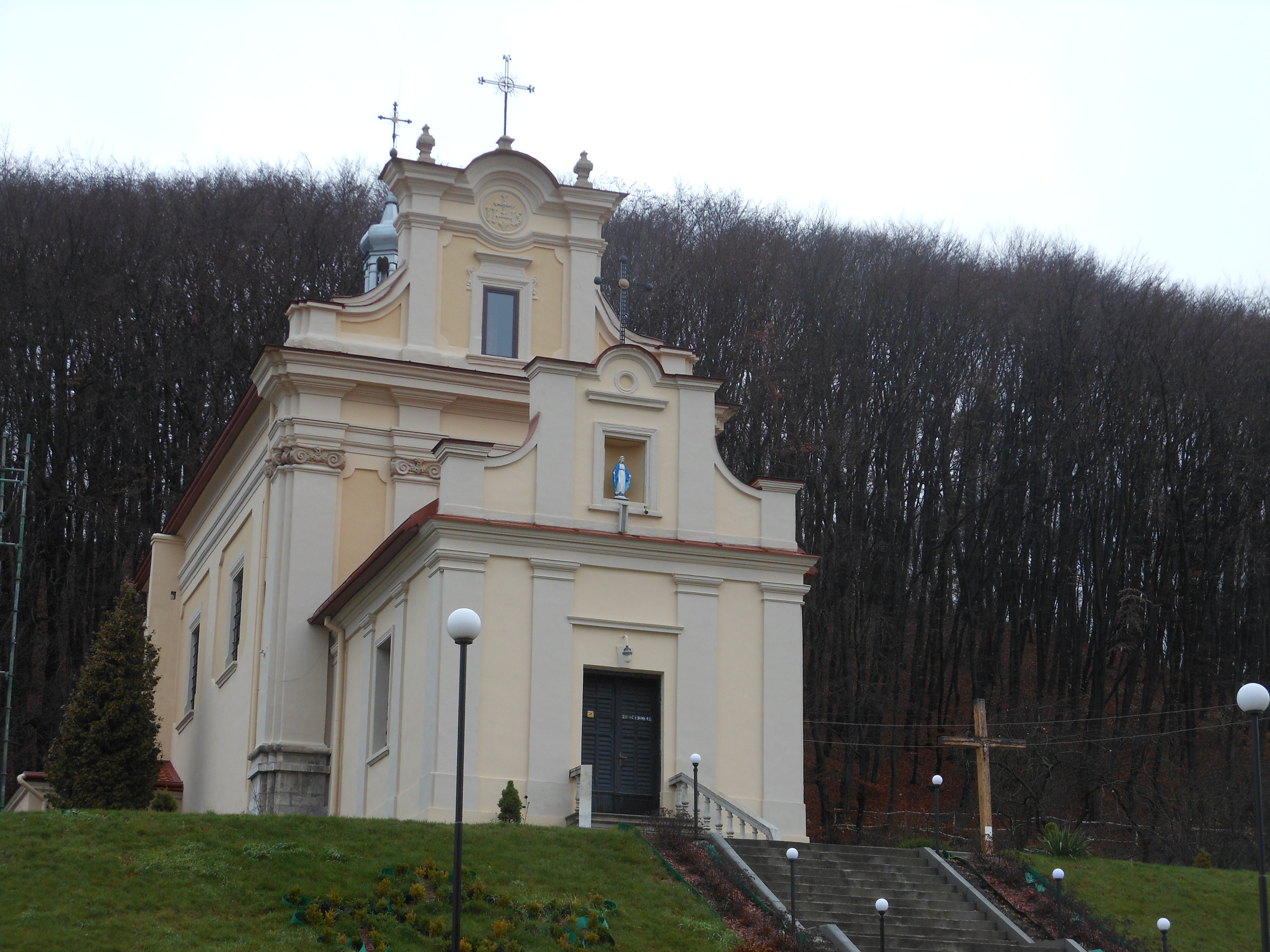 Костел [В]Небовзяття Пресвятої Діви Марії, Винники